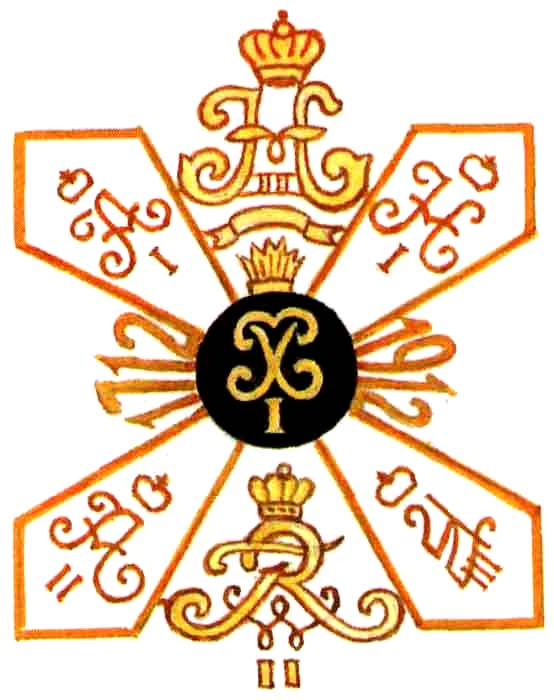 Badge of Pernovvsky 3-d Grenader Regiment